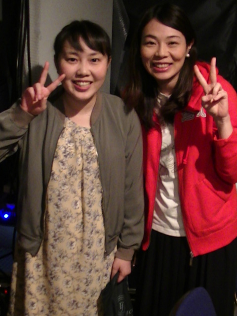 123☆45 (2019年10月20日撮影)